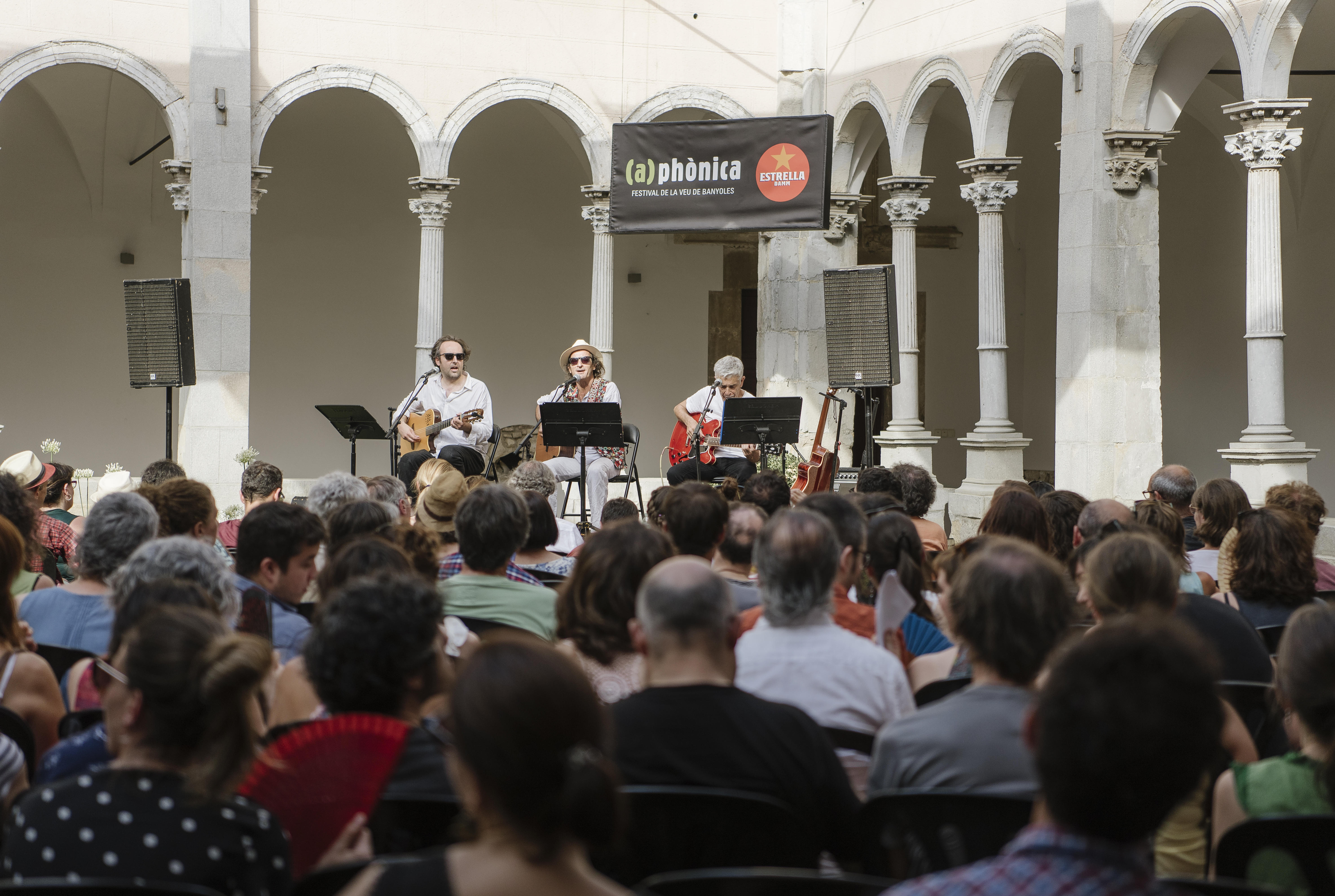 Concert al Claustre del Monestir de Sant Esteve - (a)phònica 2019